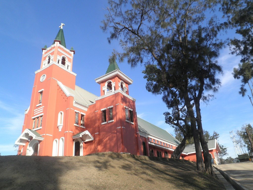 Sta. Teresinha do Menino Jesus in Ossu, Osttimor